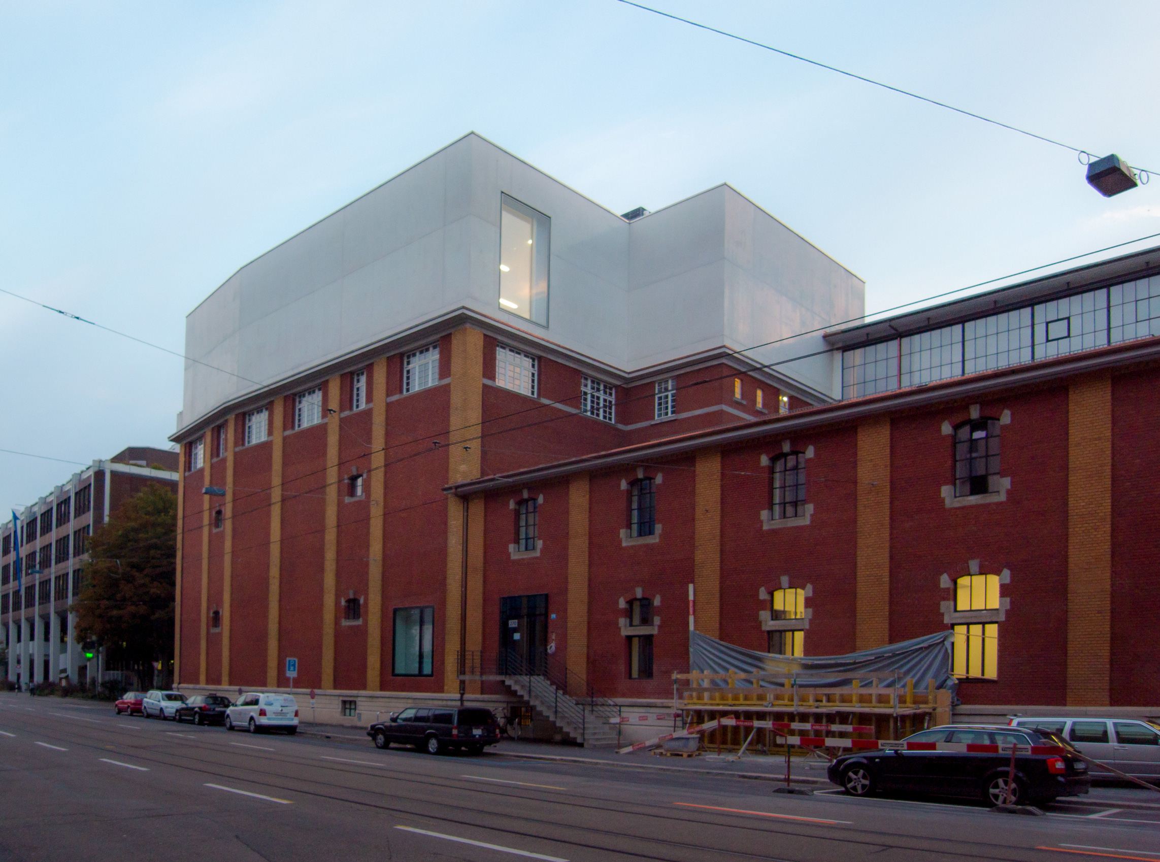 Zürich - Kunsthalle, Limmatstrasse 270